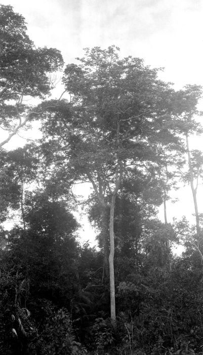 Negatief. Pentaspadon Motleyi Hook boom bij Pelandjau op West-Borneo